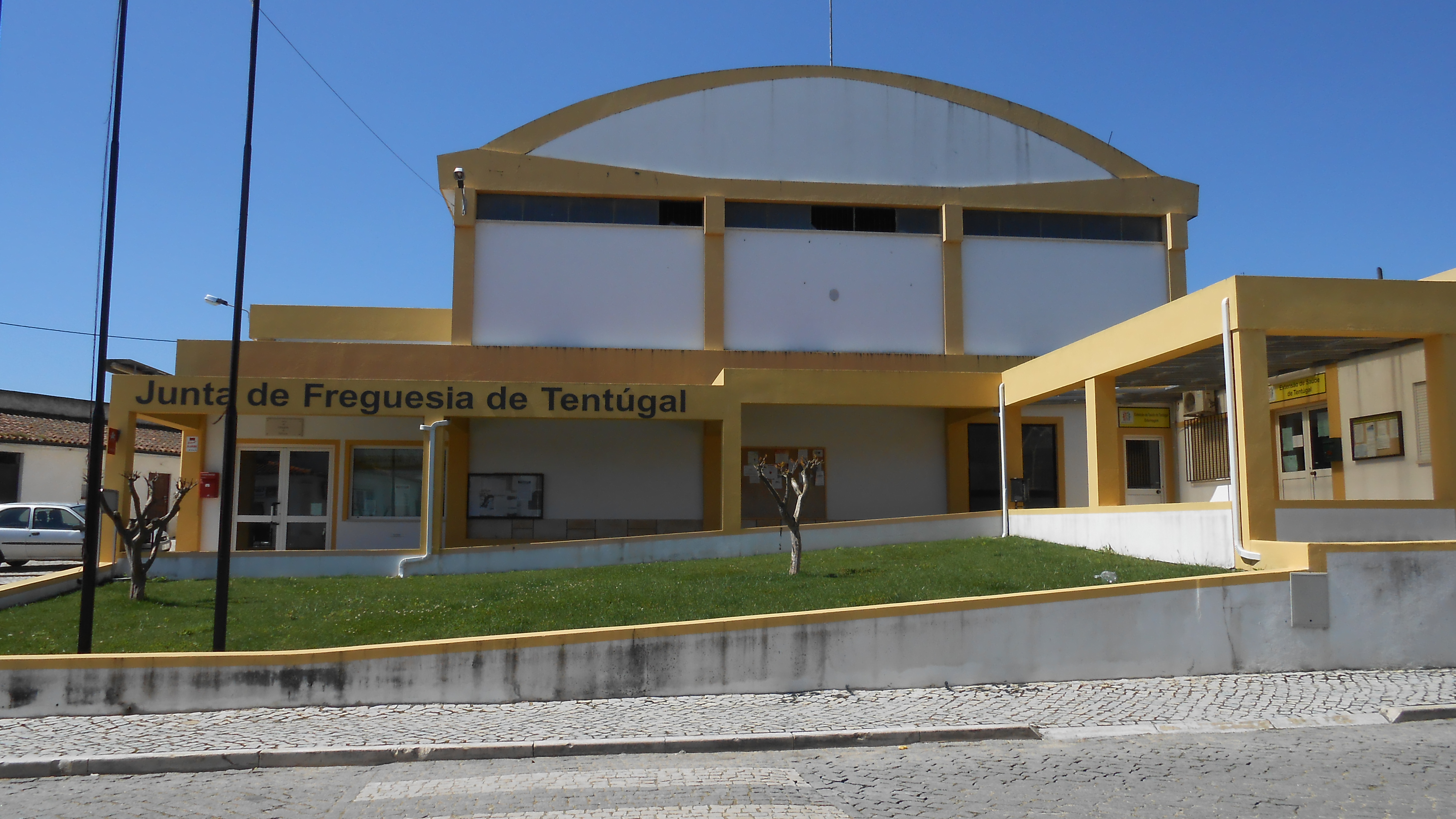 Junta de Freguesia (Gemeindeverwaltung), Tentúgal